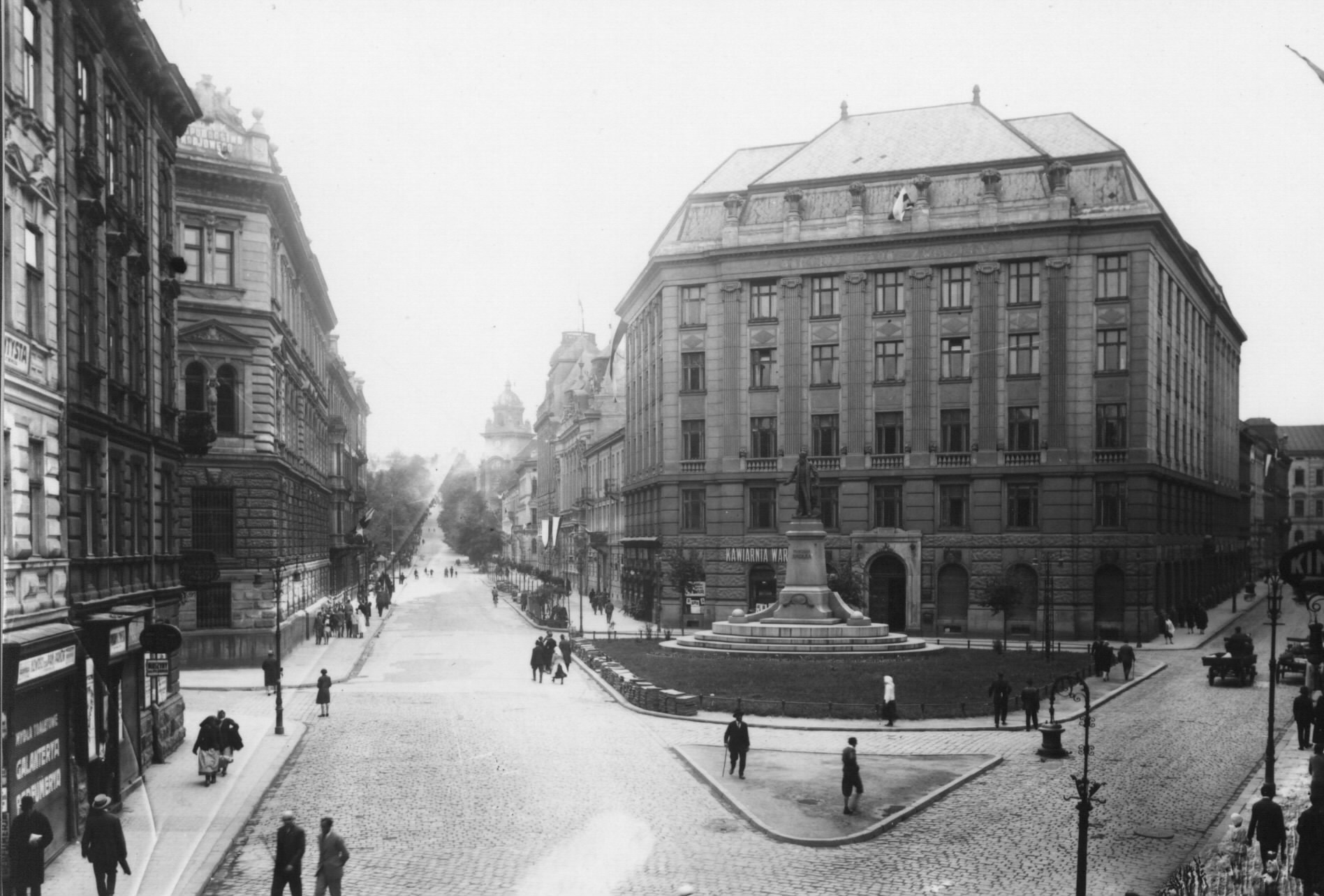 Площа Григоренка.jpg: площа Генерала Григоренка у Львові